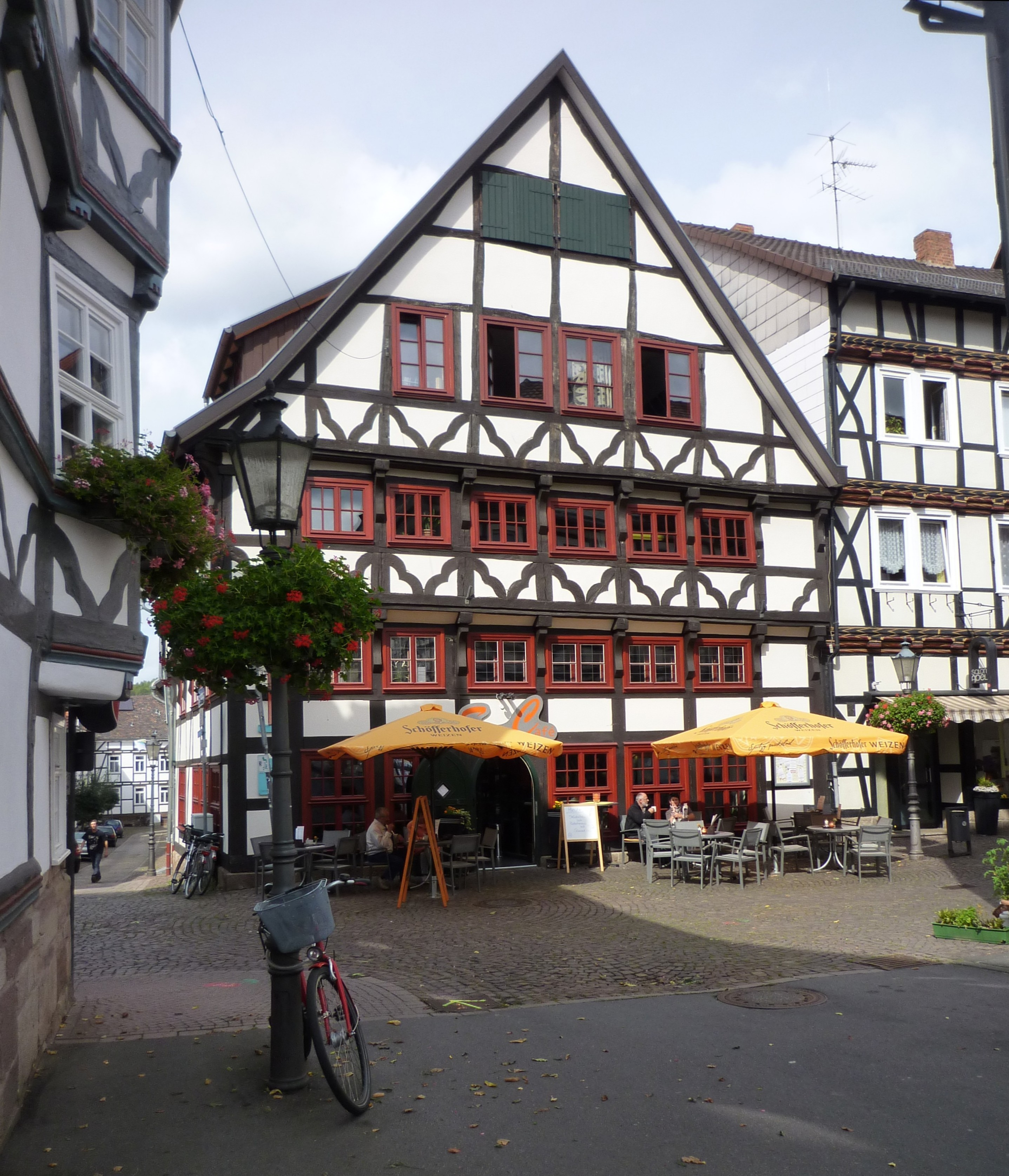 Witzenhausen - Fachwerkhaus